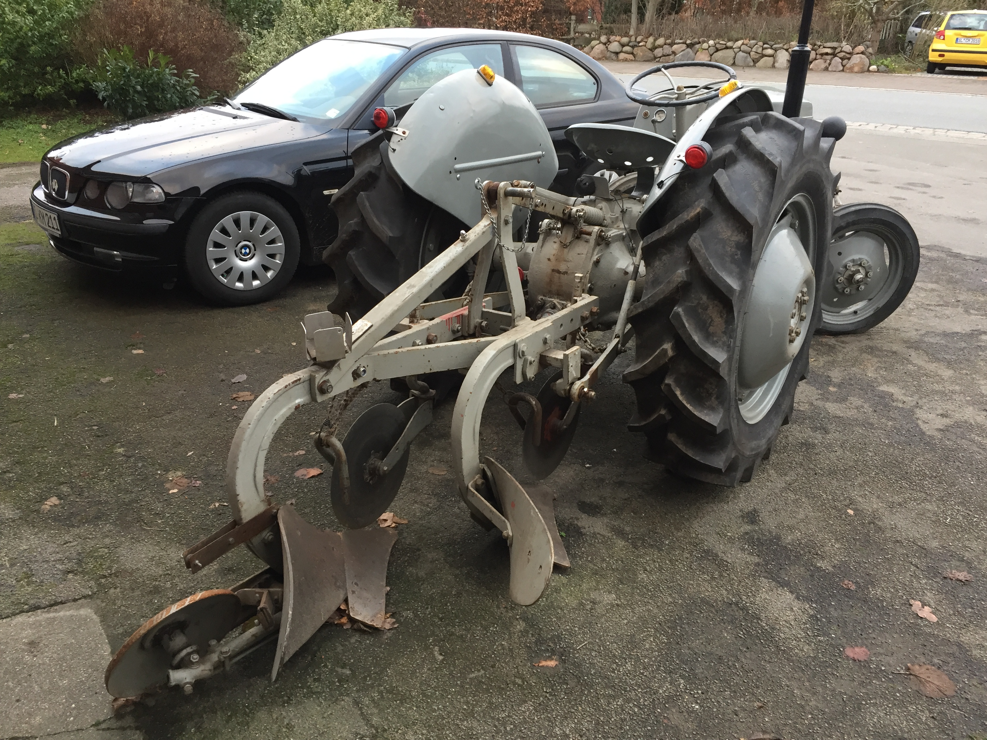 Ferguson Traktor mit Pflug